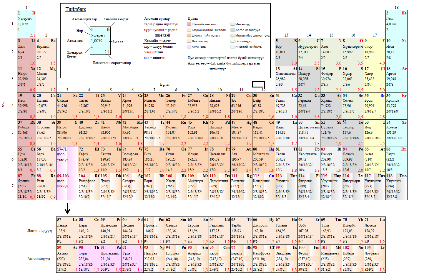 Үелэх систем Монгол: Үелэх систем